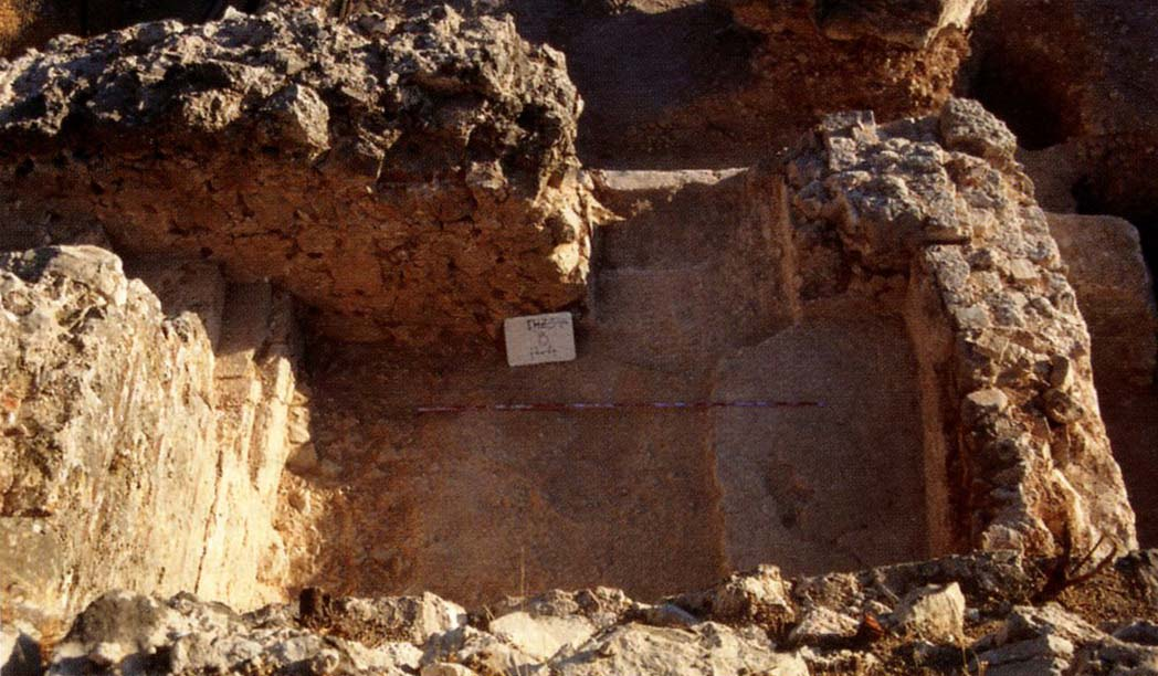 Excavación del antiguo campanario que nunca llego a construirse